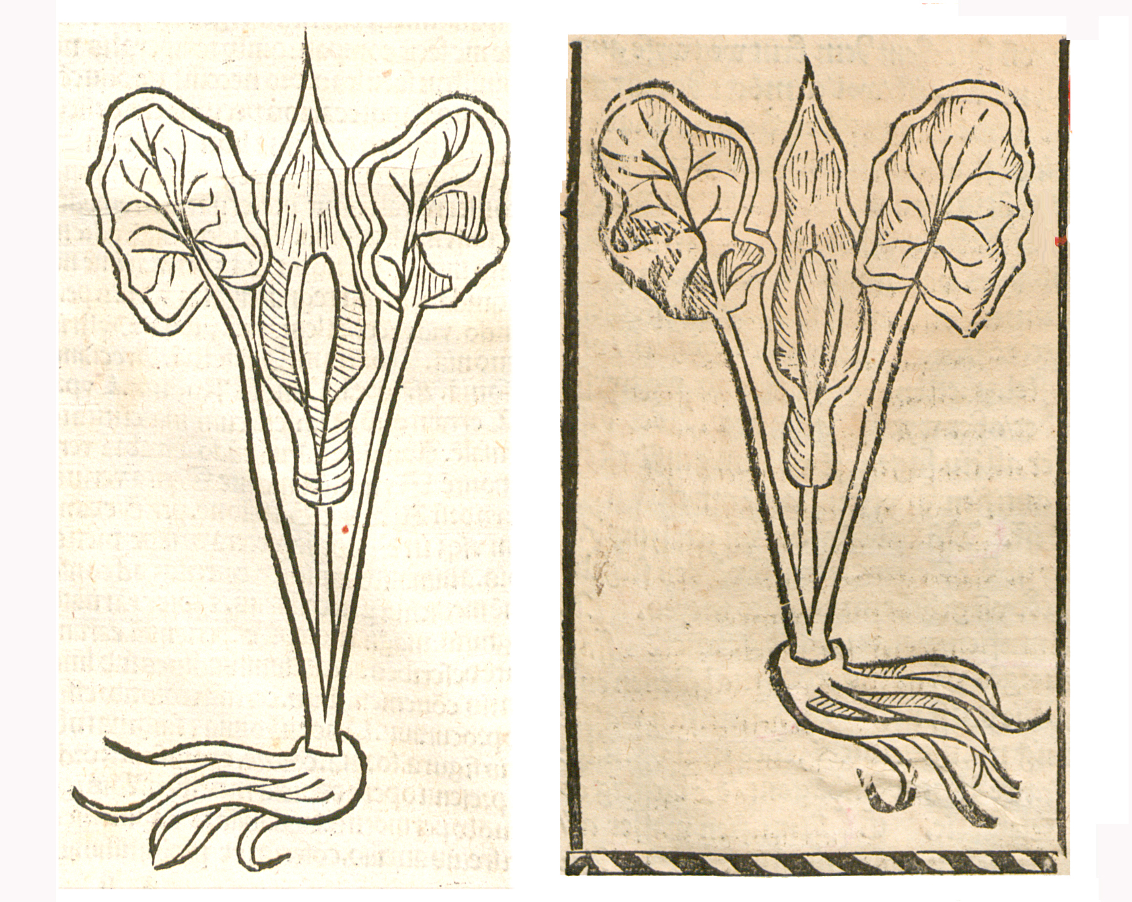 Abbildung von Aron (Arum maculatum)